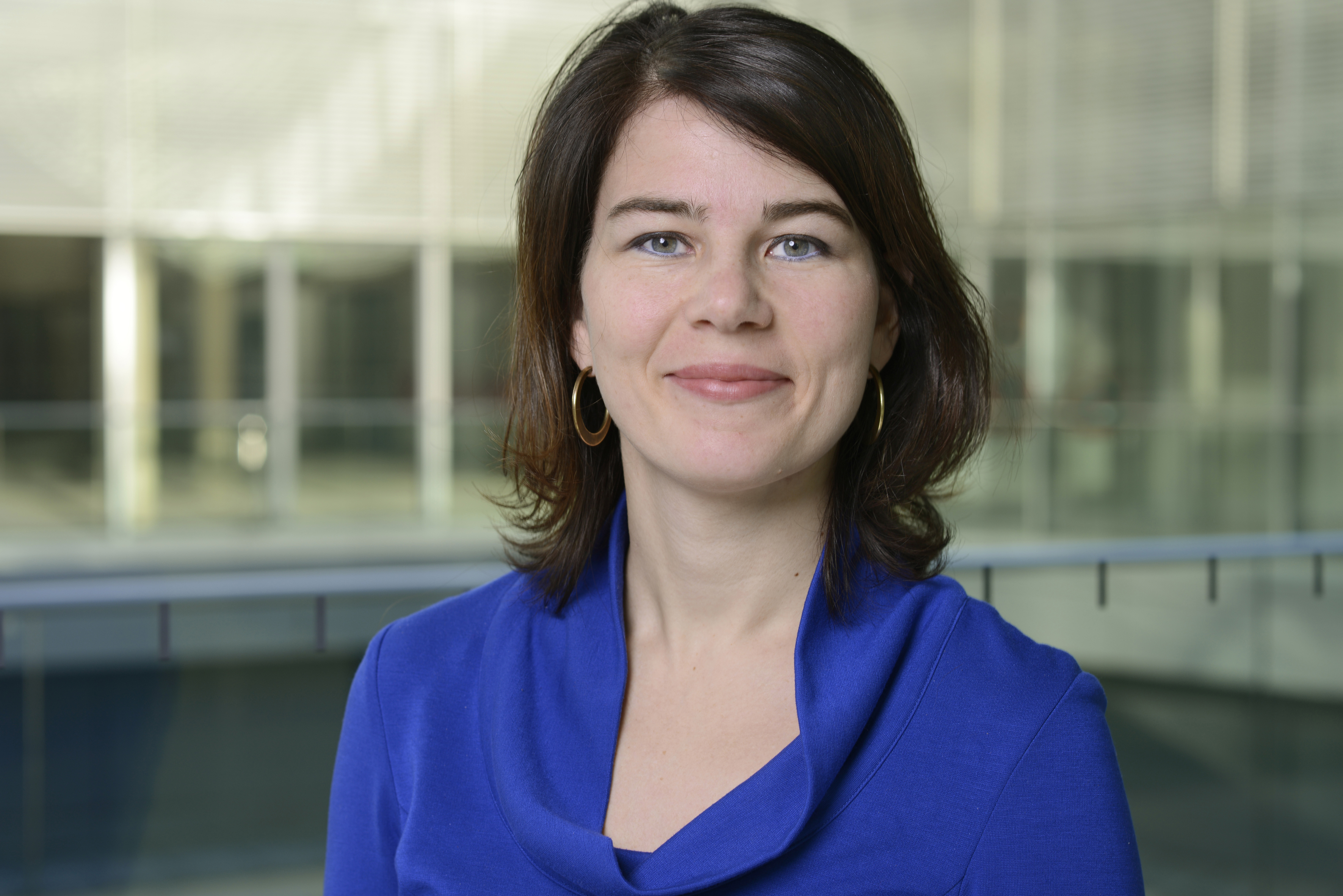 Annalena Baerbock (* 15. Dezember 1980 in Hannover) ist eine deutsche Politikerin der Grünen und Bundestagsabgeordnete. Sie ist Mitglied des Parteirats von Bündnis 90/Die Grünen und war von 2009 bis 2013 Vorsitzende des Landesverbands Brandenburg.